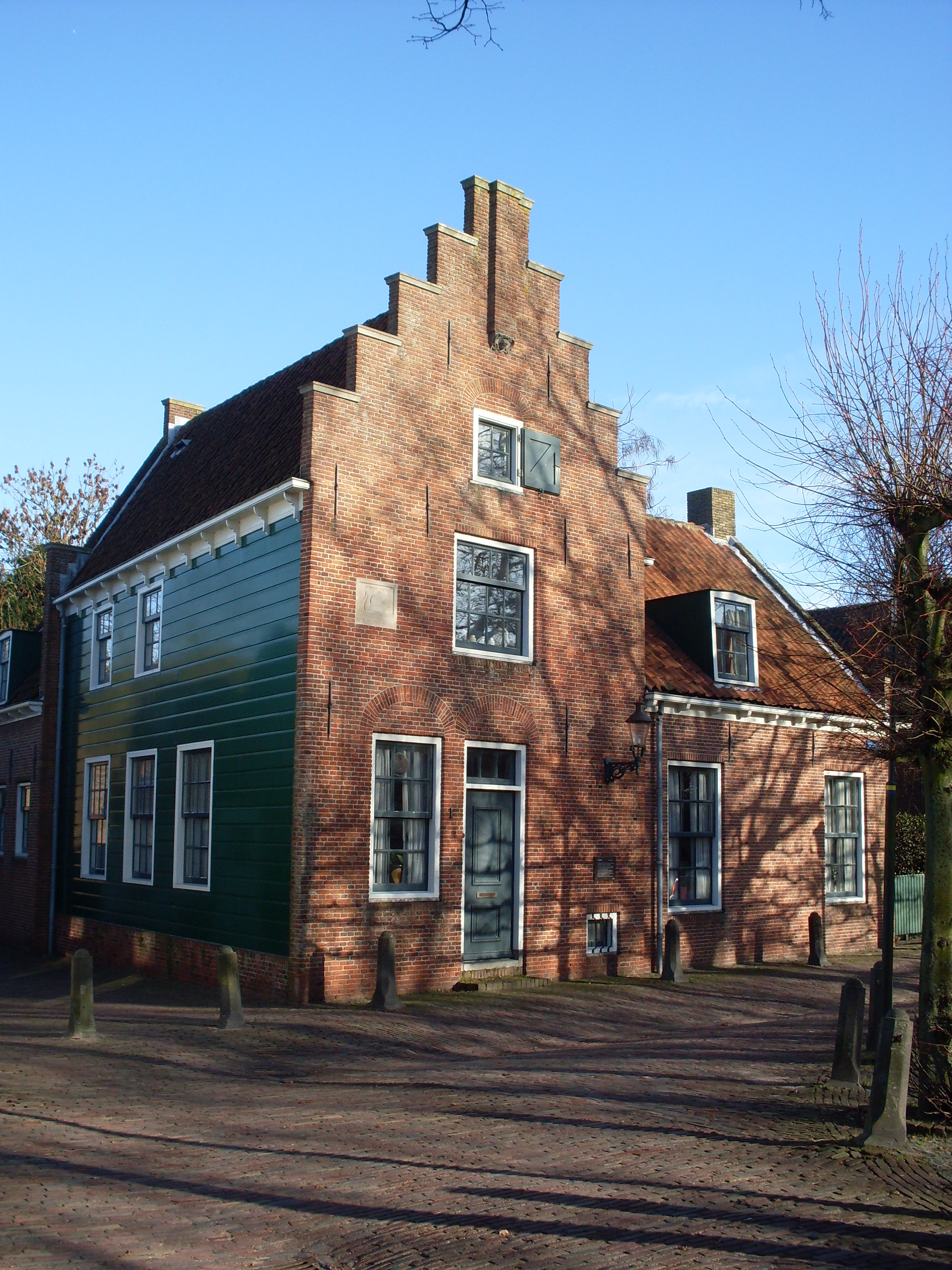 De Swaen, Schevelstraat 1, Uitgeest.